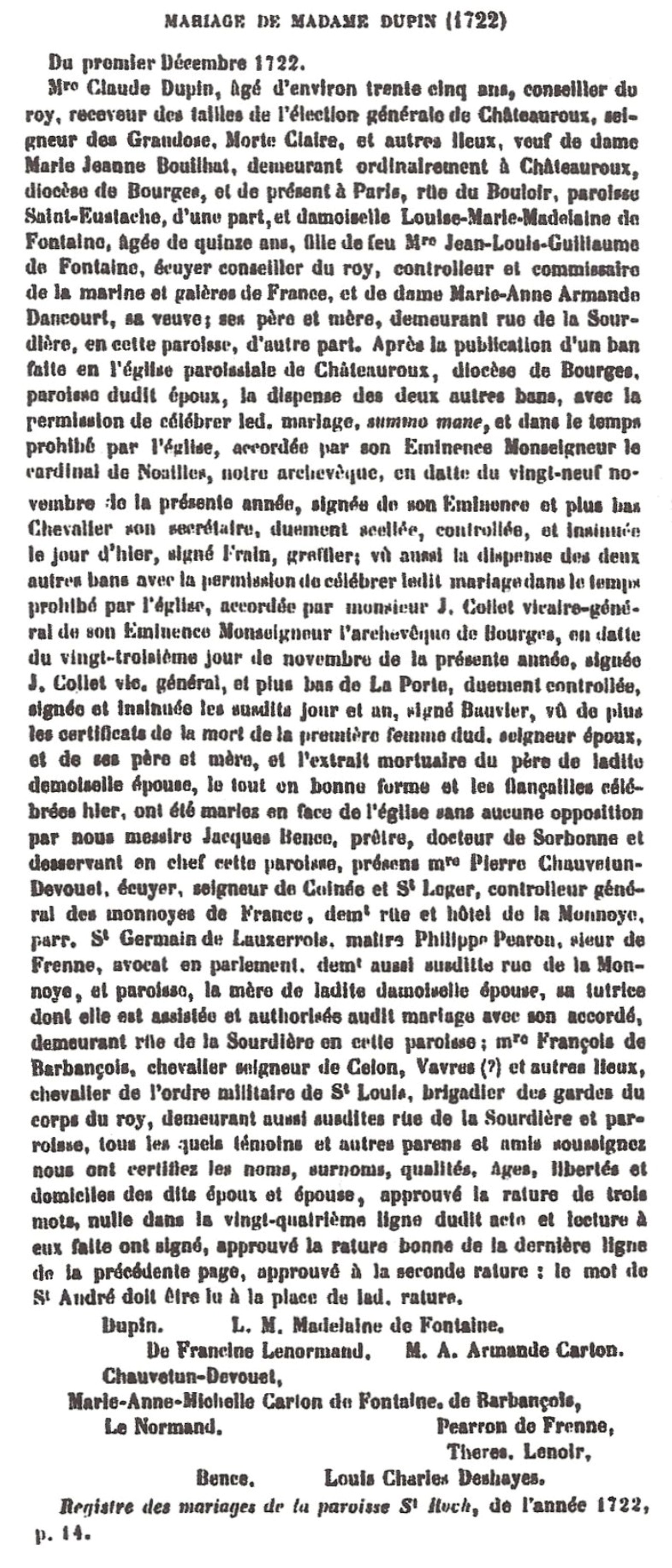 Acte de mariage de Claude Dupin (1686-1769) et Louise de Fontaine (1706-1799). Registres paroissiaux de Paris, église Saint-Roch, en date du 1er décembre 1722. La collection originale des archives paroissiales et d'État-civil a été détruite lors de l'incendie de l'Hôtel de ville de Paris, le 24 mai 1871.